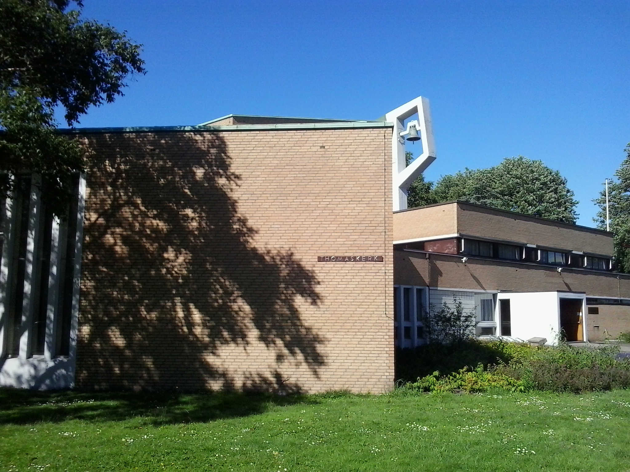 Thomaskerk in Amsterdam-Z, gezien vanaf hoek Prinses Margiet / Irenestraat.